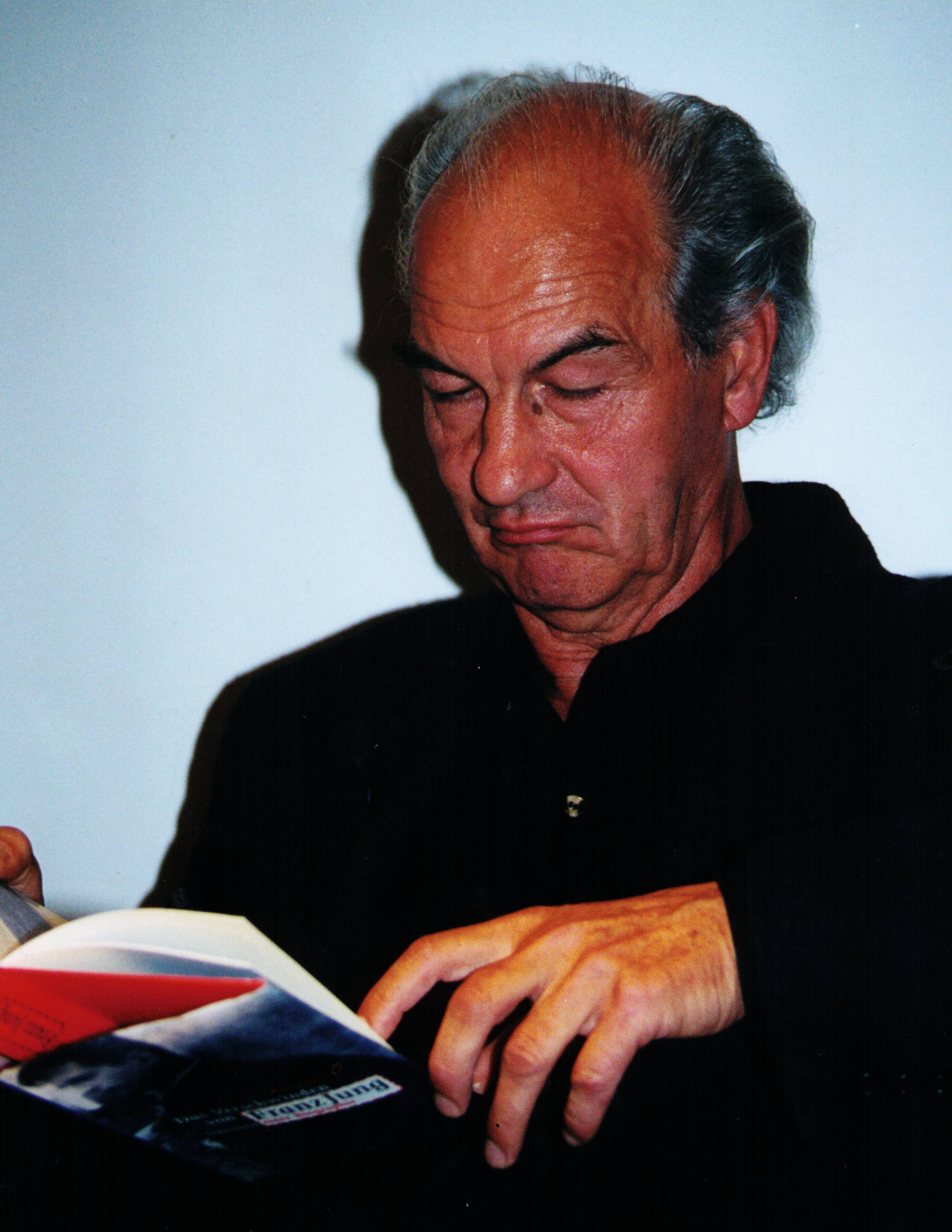 Fritz Mierau, von Lothar Deus, Photograph, aufgenommen. Verwendung für Wikipedia erlaubt.